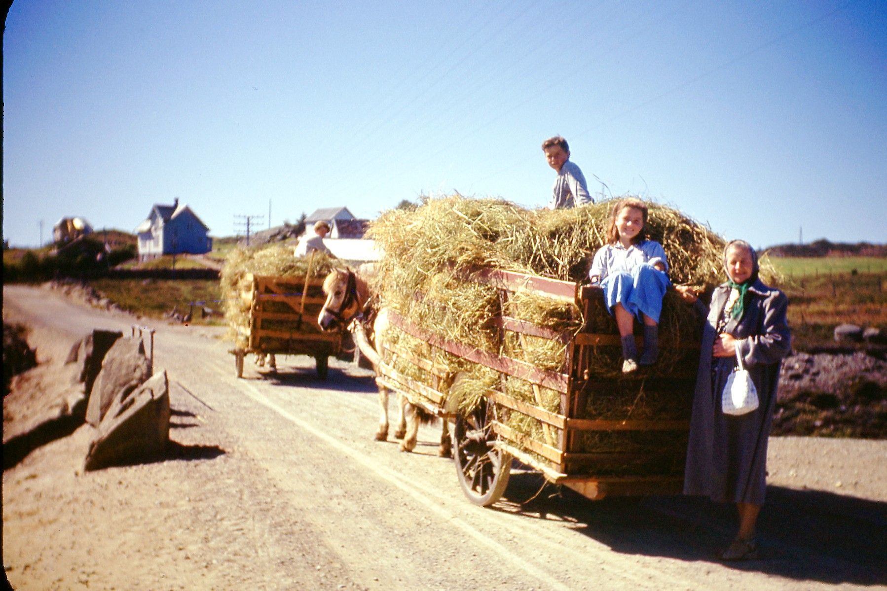 Haymaking in Norway